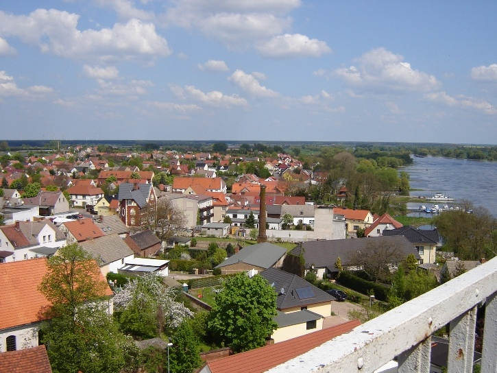 Luftbild von Rogätz (Sachsen-Anhalt)